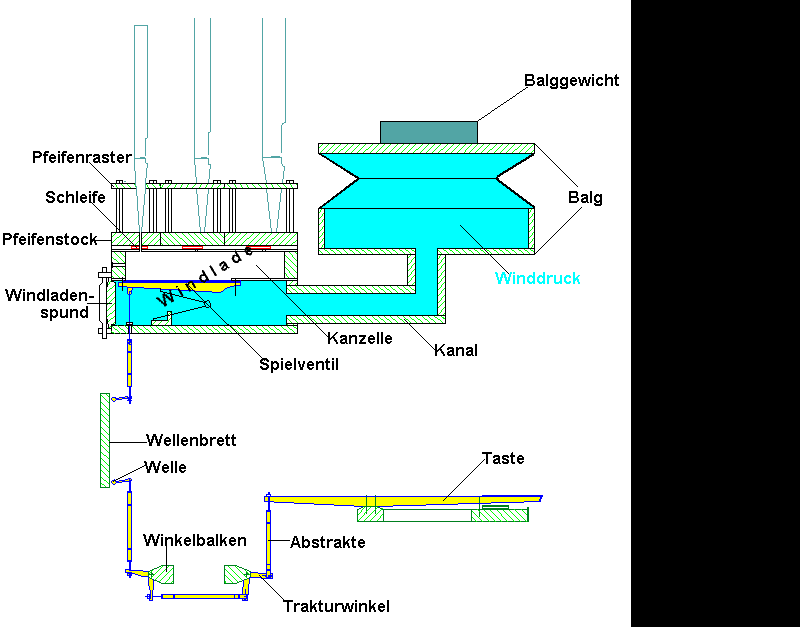 Teile einer Orgel